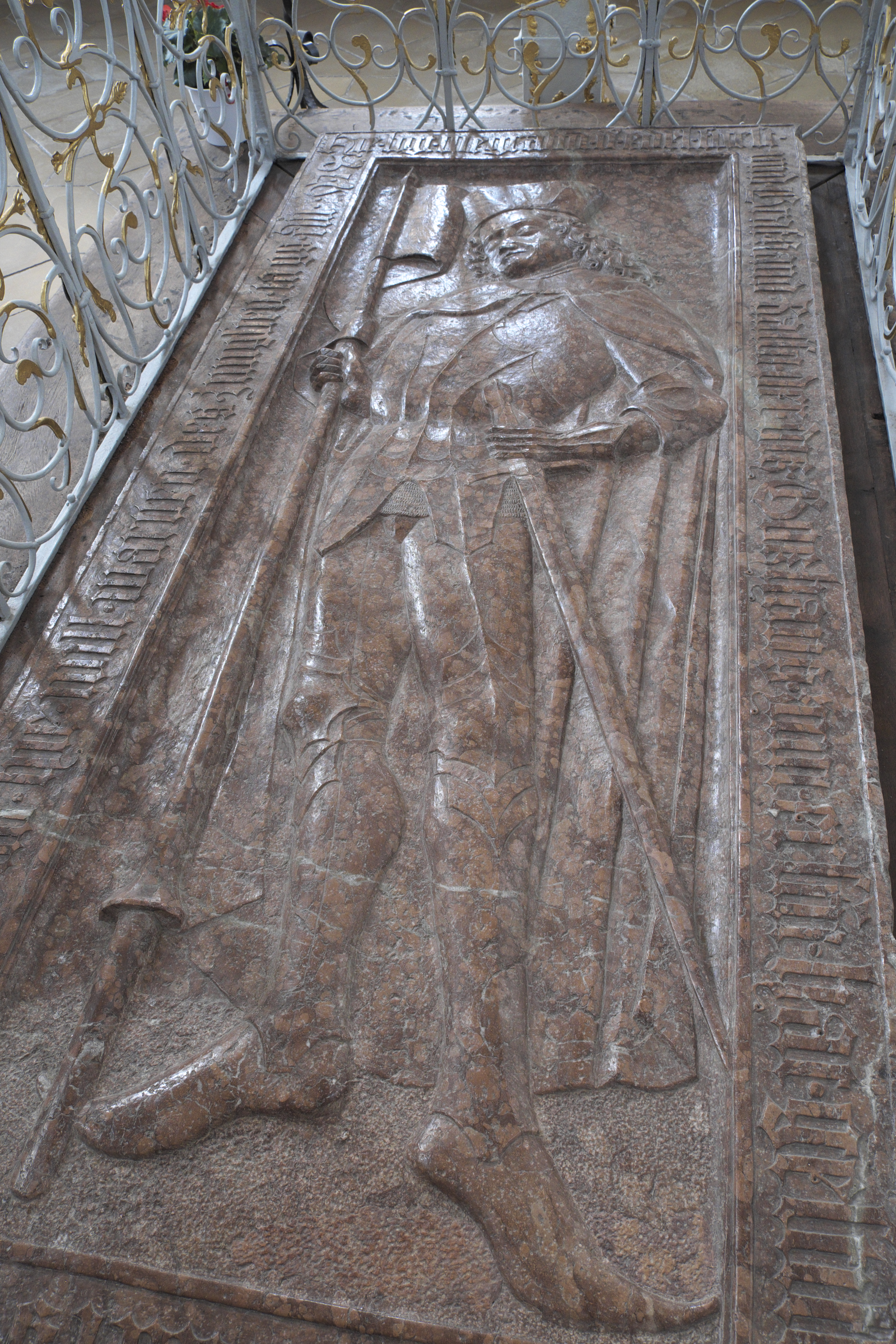 Katholische Wallfahrtskirche St. Rasso in Grafrath im Landkreis Fürstenfeldbruck (Bayern/Deutschland), Stiftergrab des heiligen Rasso, Rotmarmorplatte von Matthäus Haldner